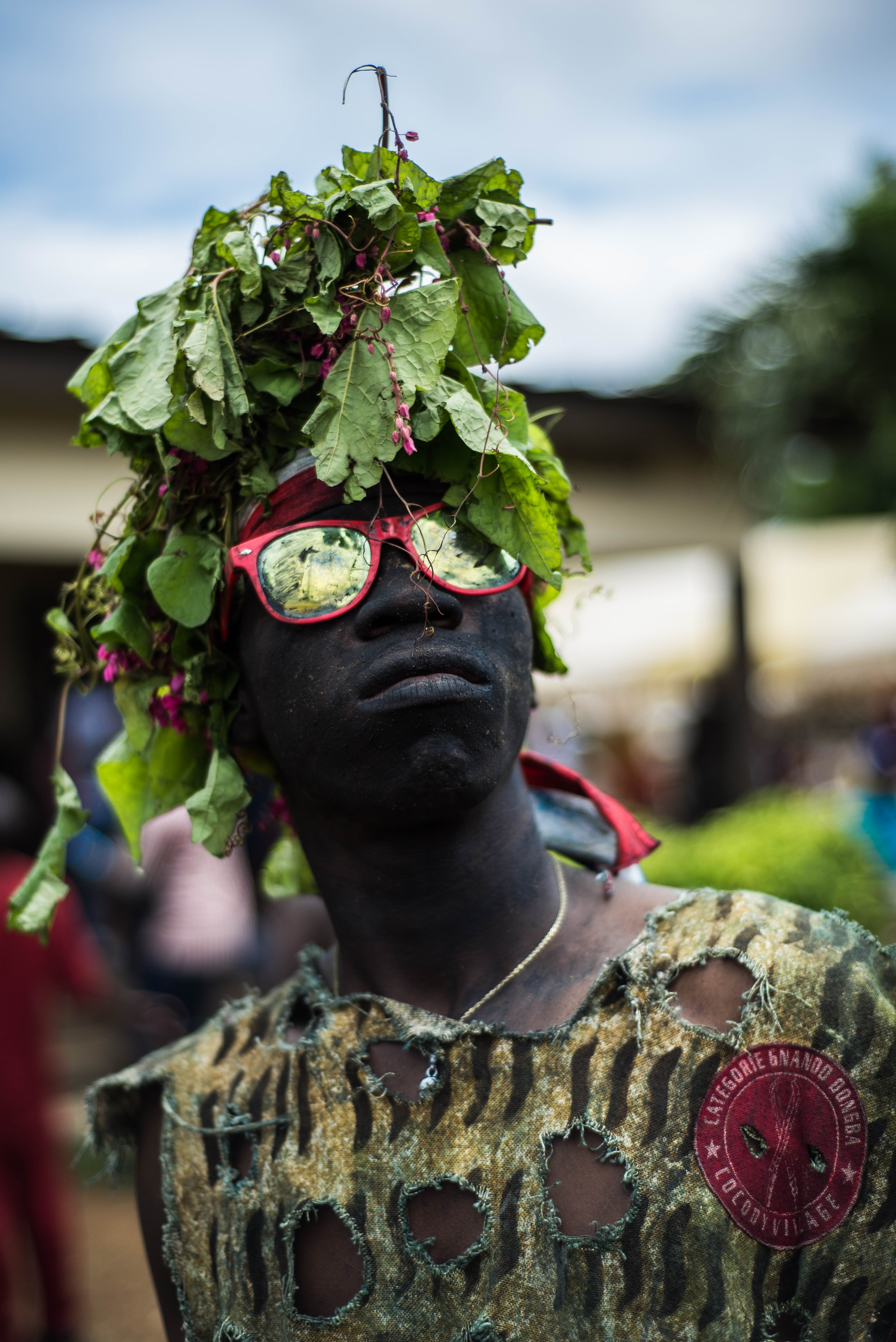 Un jeune de la génération bléssoué lors de la fête de génération chez peuple Ebrié This is an image with the theme "Africa on the Move or Transport" from: Ivory Coast